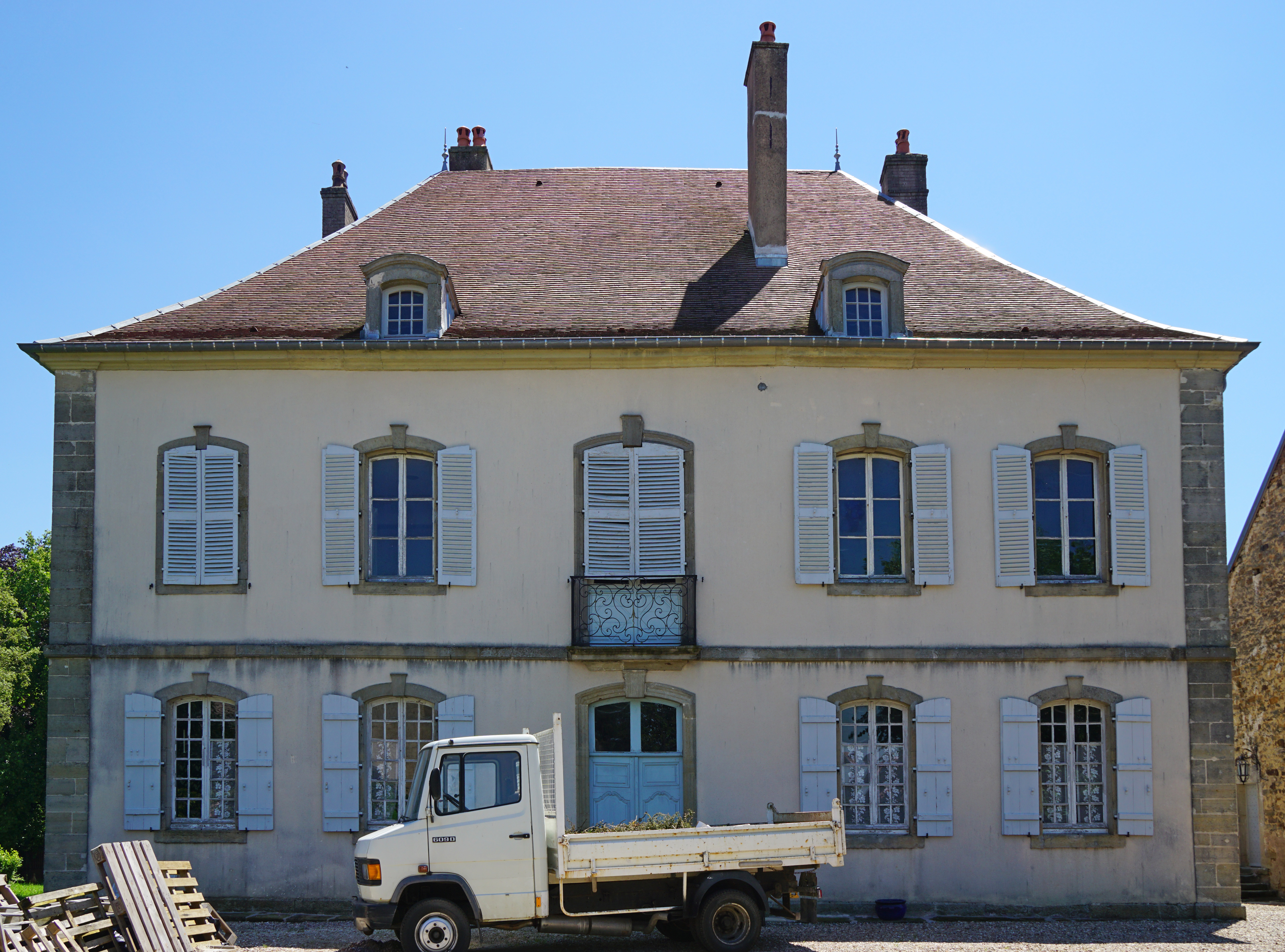 Château de Saulx (Haute-Saône).